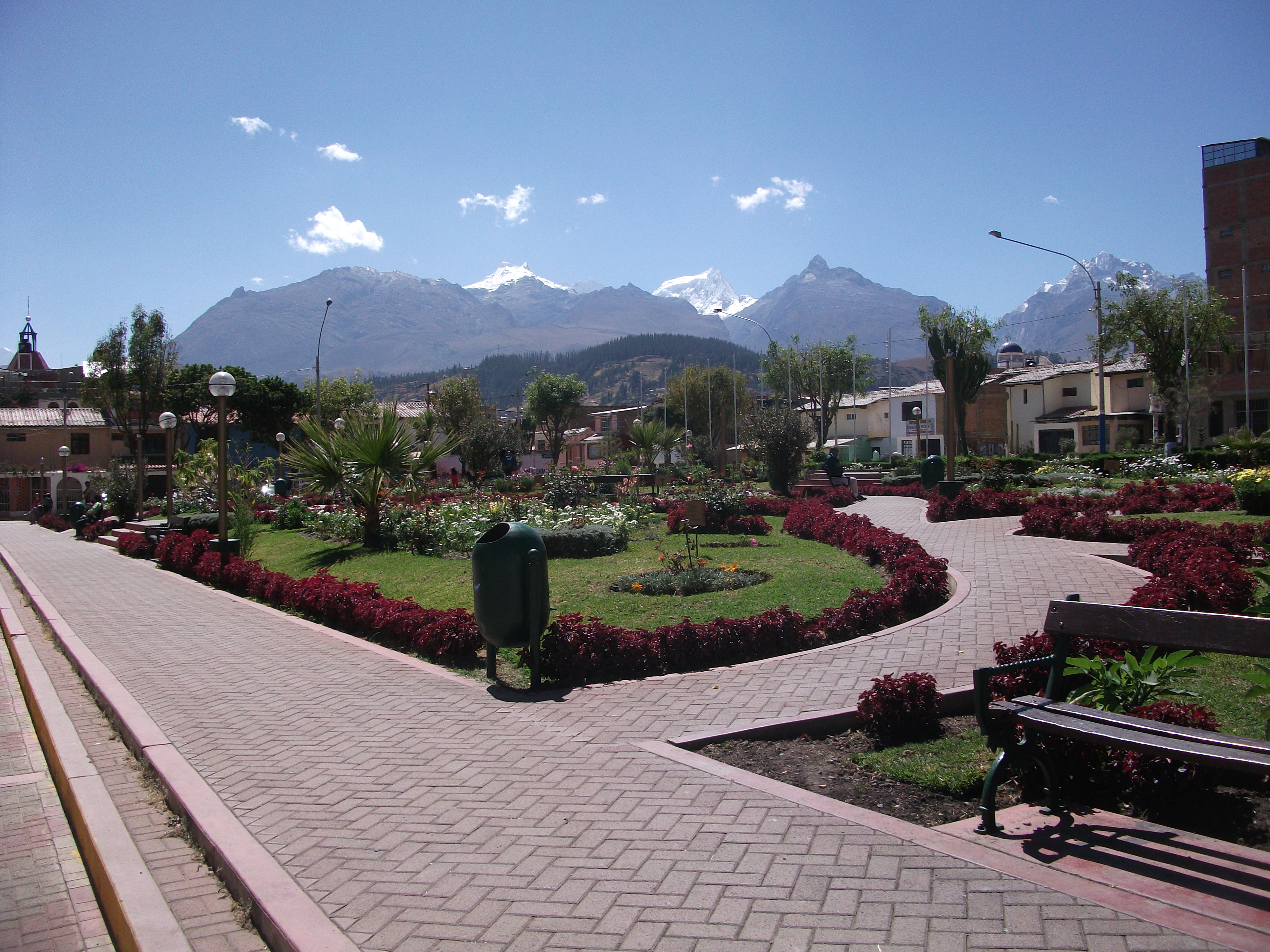 Parque de la amistad Internacional o Parque de los Pollos